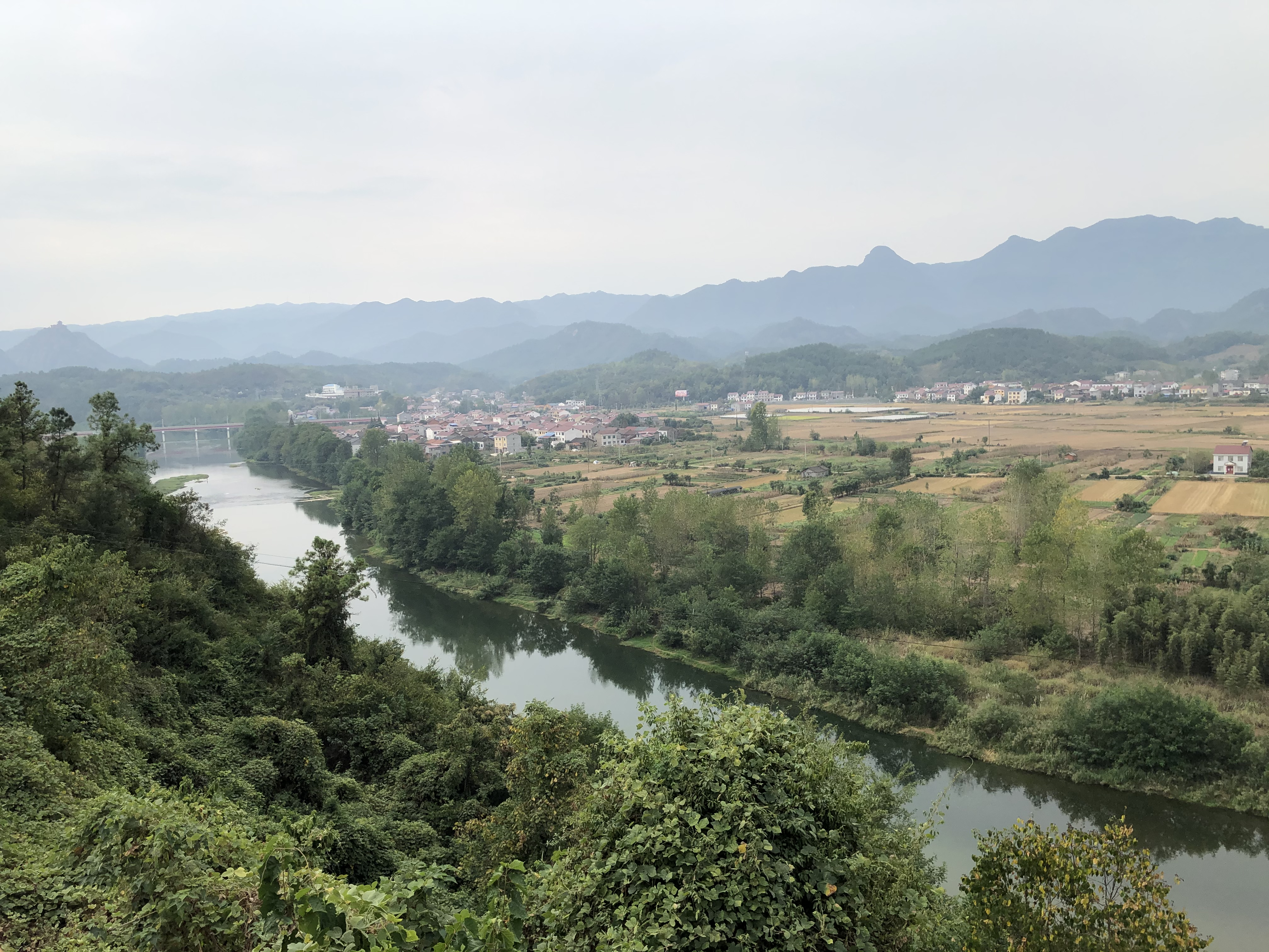 中文（中国大陆）: 远安县旧县镇安鹿村第二村民小组安洋坪和第三村民小组徐家台